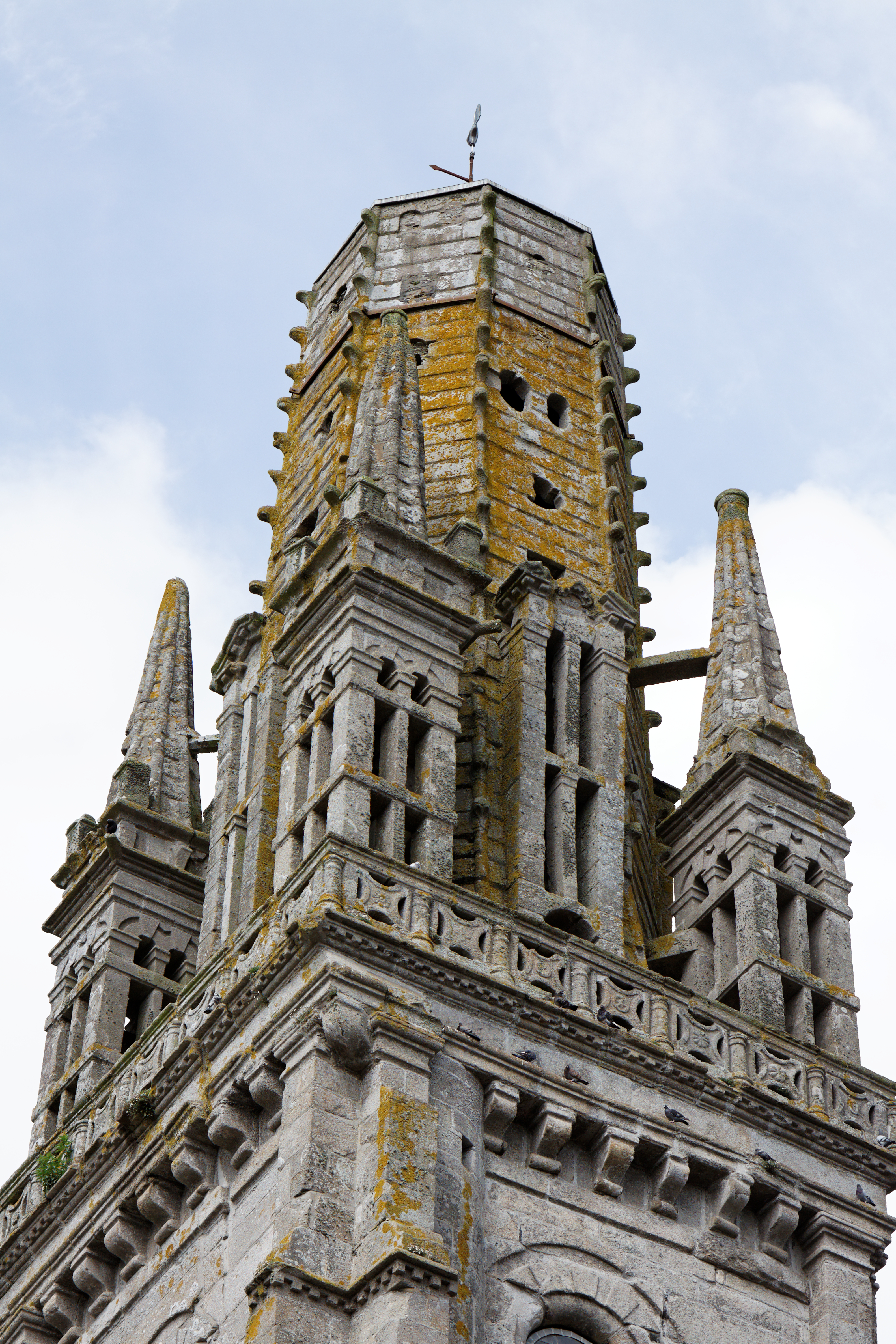 Le clocher tronqué. .